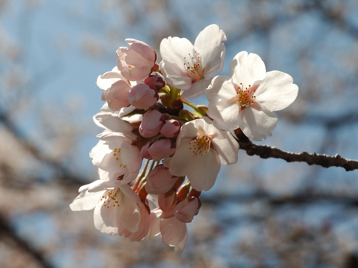 Prunus serrulata (サクラ)